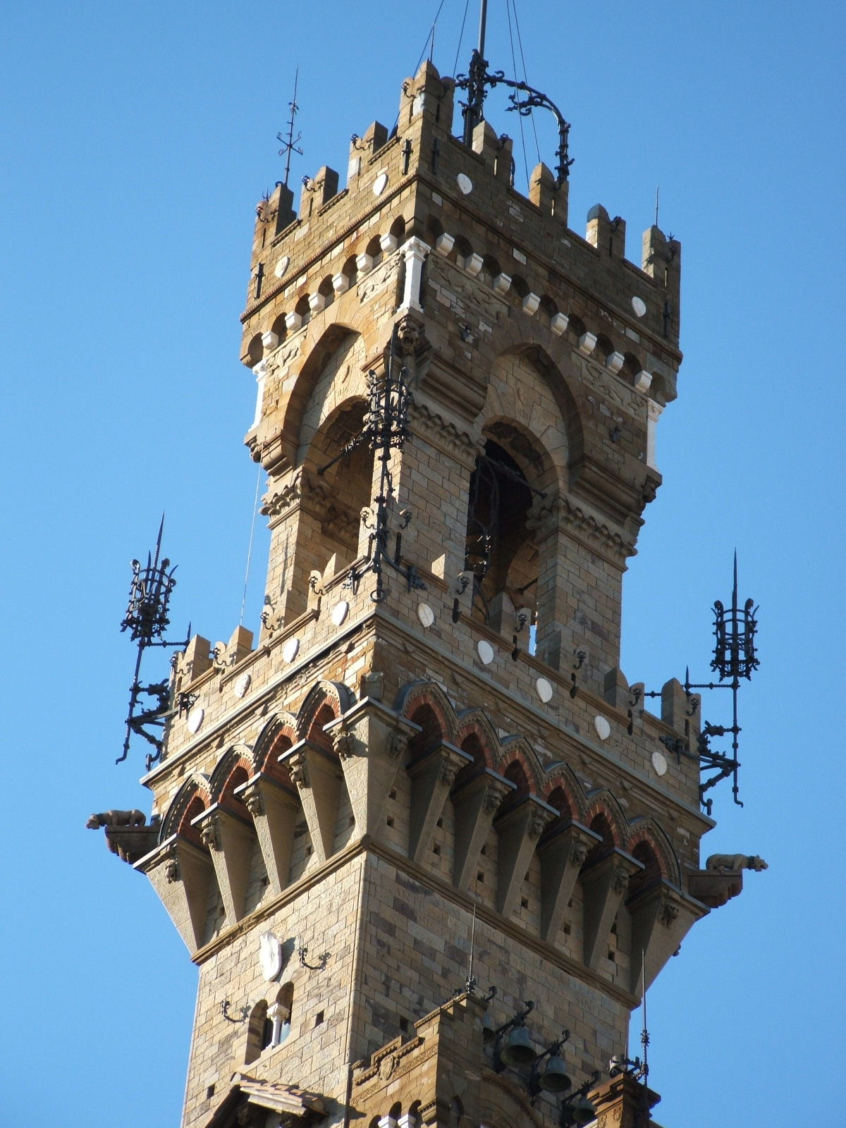 Genova, Castello Mackenzie